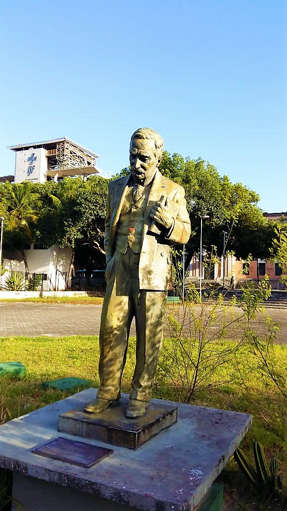 Estátua de Clovís Beviláquia na praça da Bandeira em Fortaleza. Atual praça Clóvis Beviláquia.